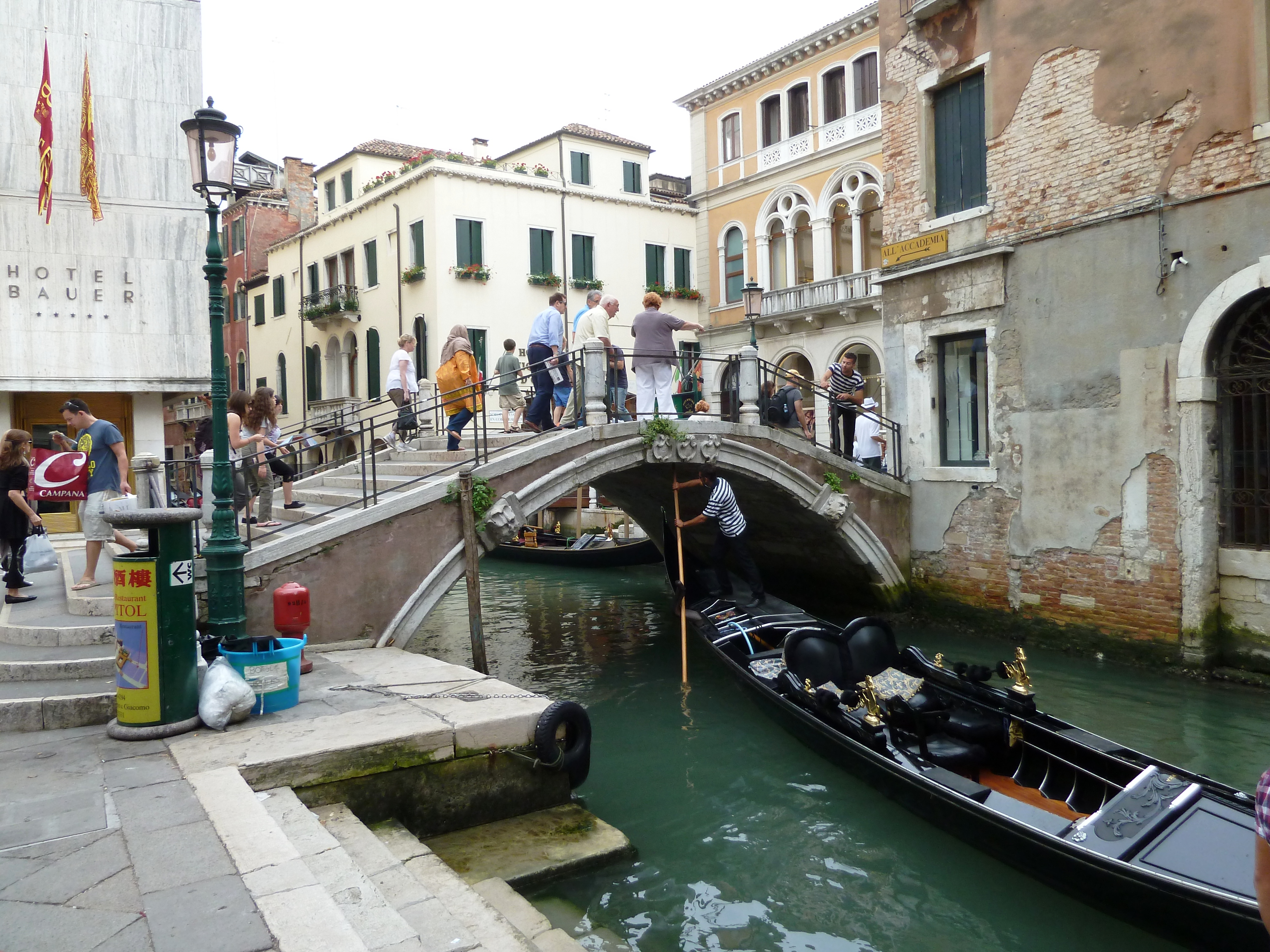 Ponte de San Moise (Venice)